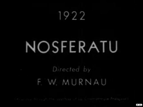 Nosferatu egyik képkockája